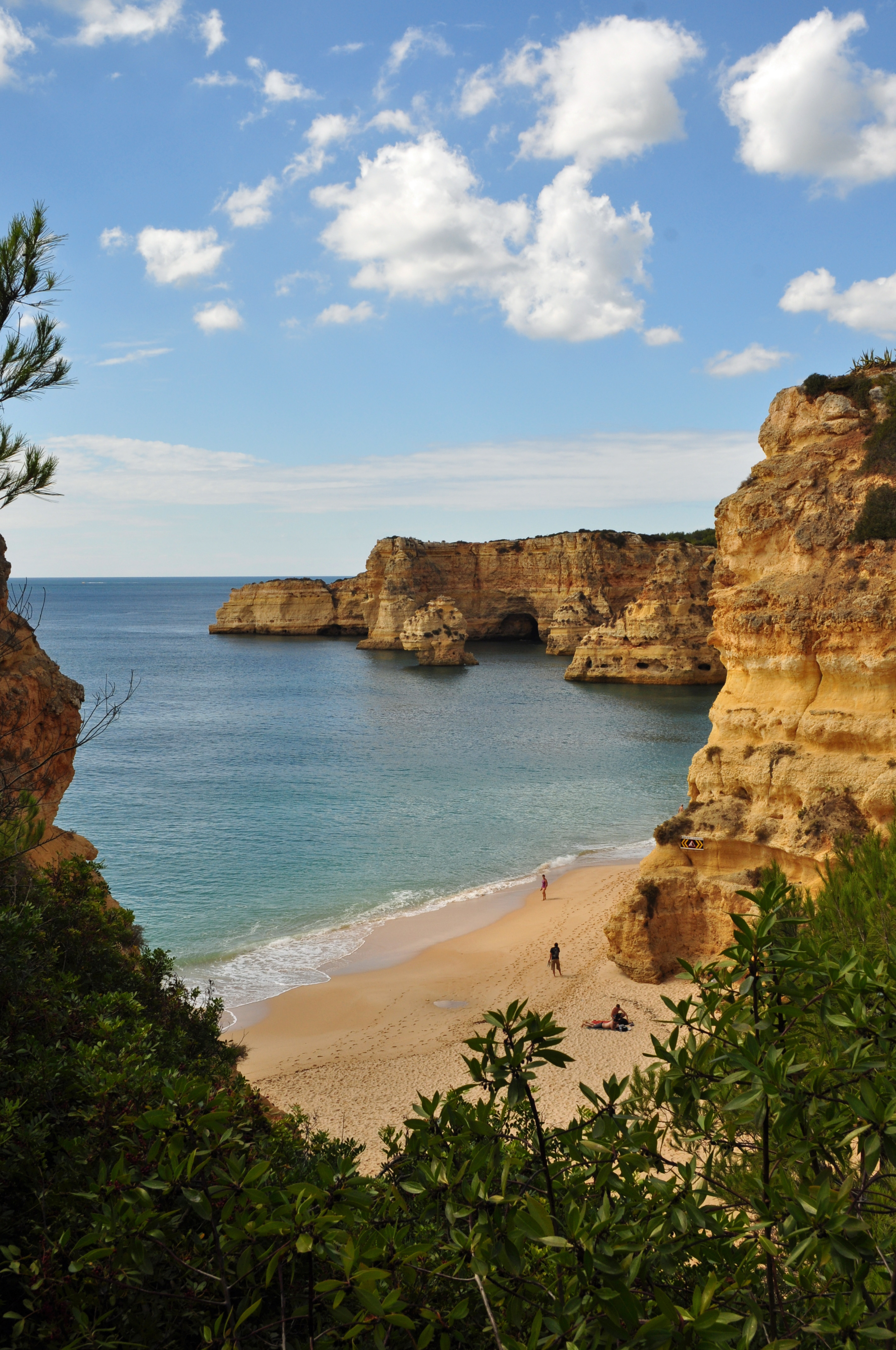 Praia da Marinha (2012-09-27), by Klugschnacker in Wikipedia (86)